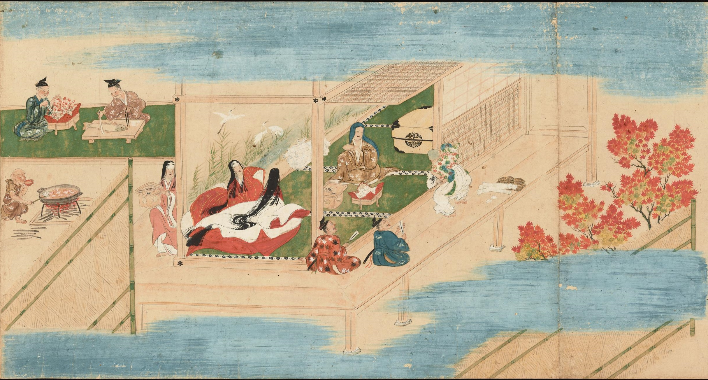 Seikō-ji engi emaki, rouleau 2, peinture 3